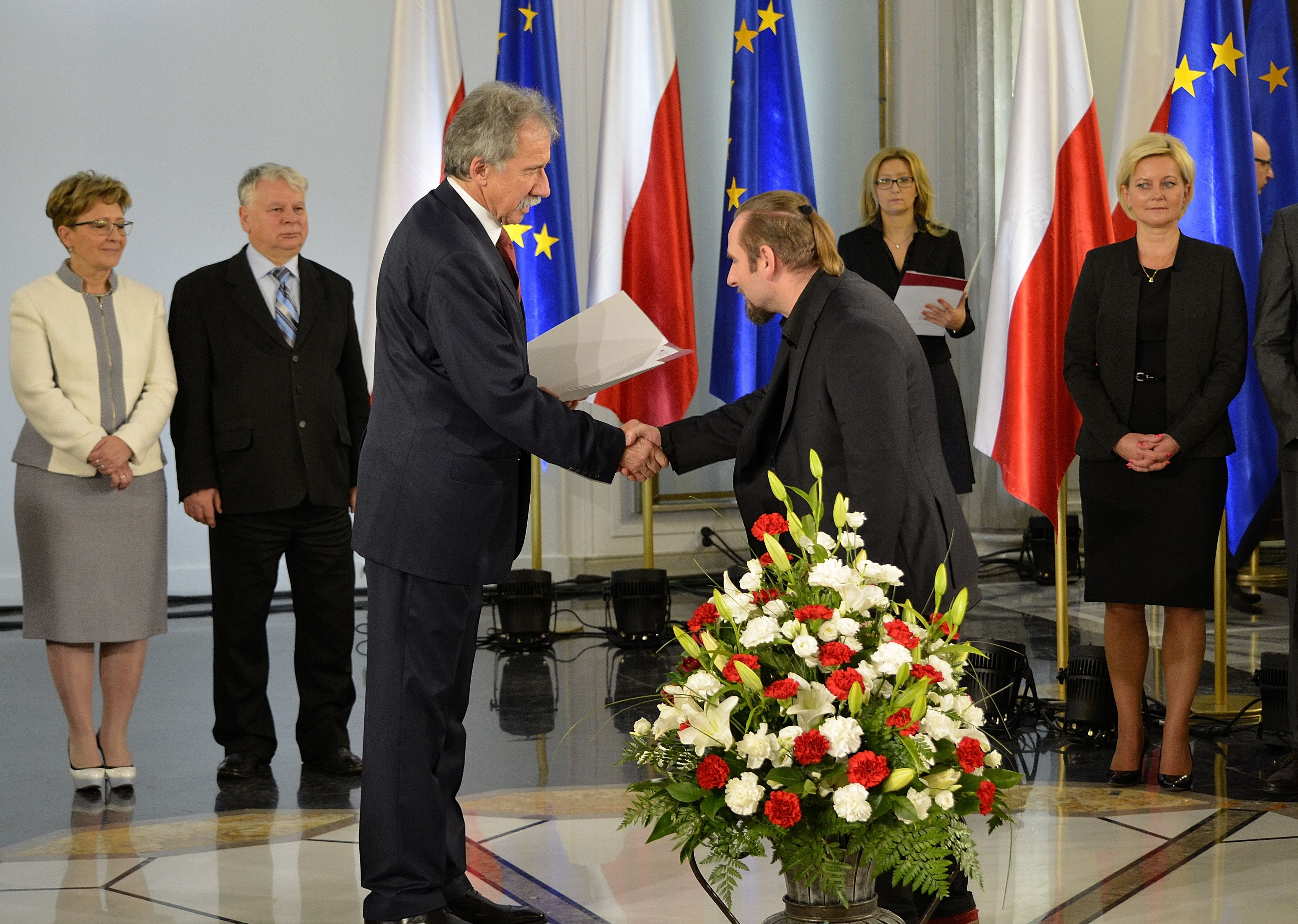 Poseł Piotr Liroy-Marzec podczas uroczystości wręczenia zaświadczeń o wyborze nowo wybranym posłom w Sali Kolumnowej Sejmu